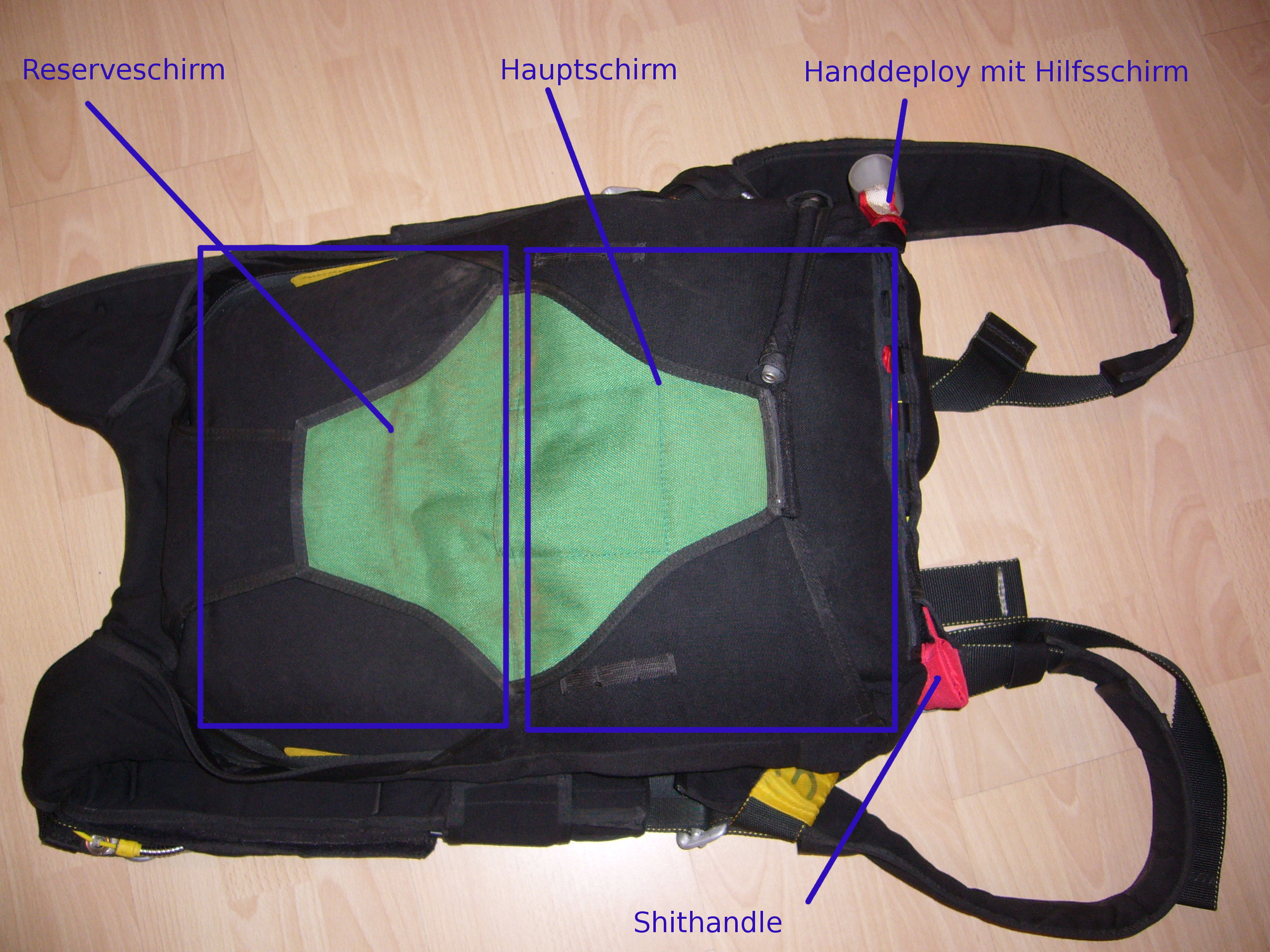 Fallschirm Rig Schülerfallschirm mit Erklärungen und Beschreibungen